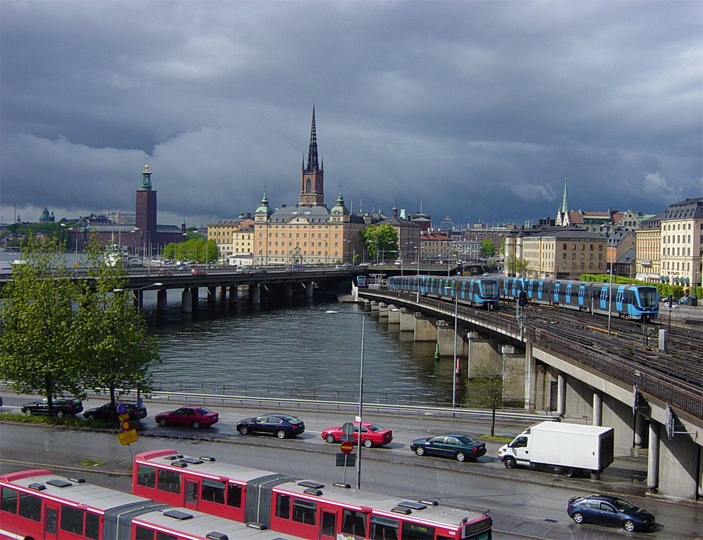 Stockholmsutsikt från Södermalmstorg, med Riddarholmen i centrum :: Stockholm scenery from Södermalmstorg, with Riddarholmen in centre.